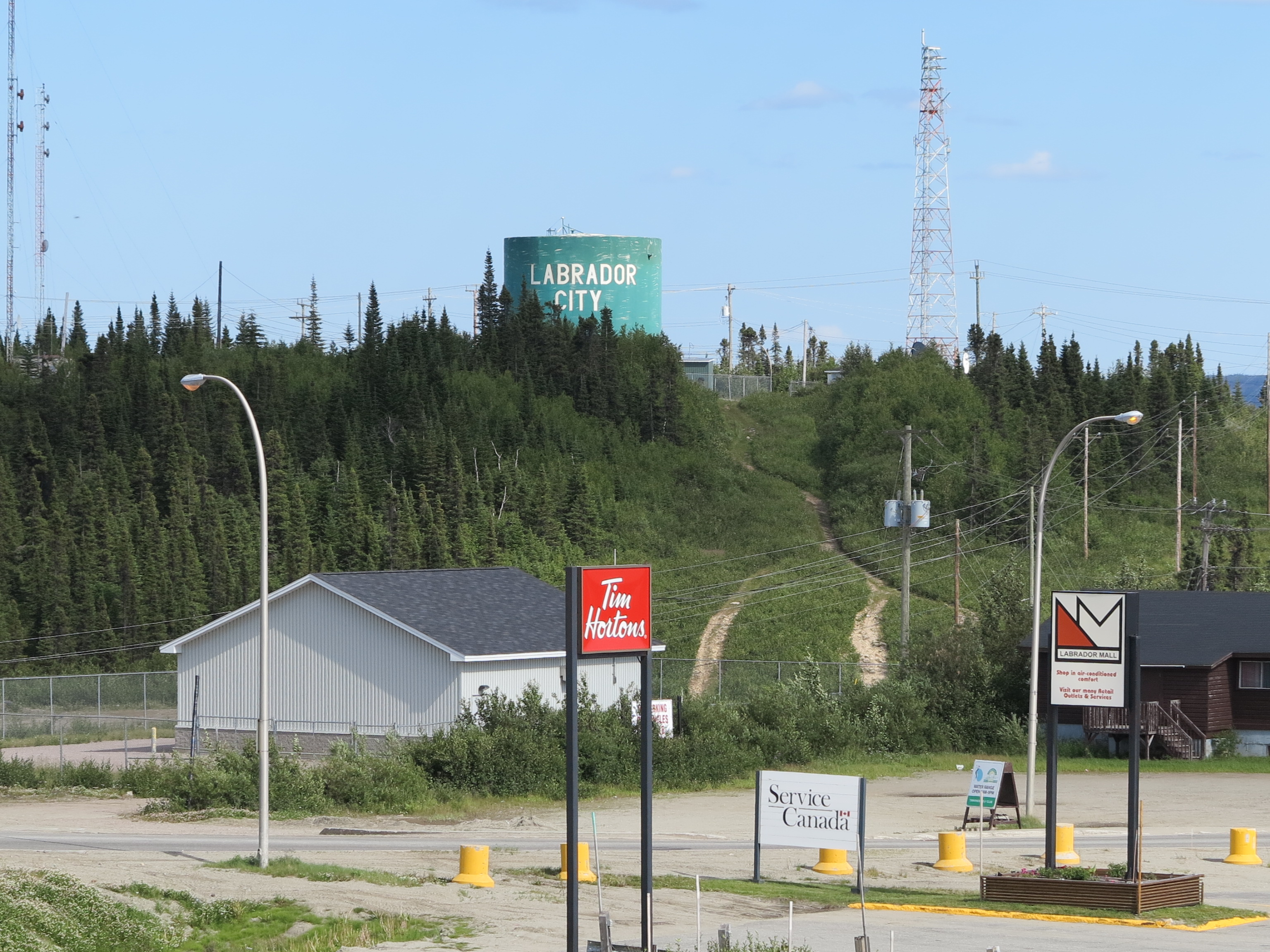 view city-limits